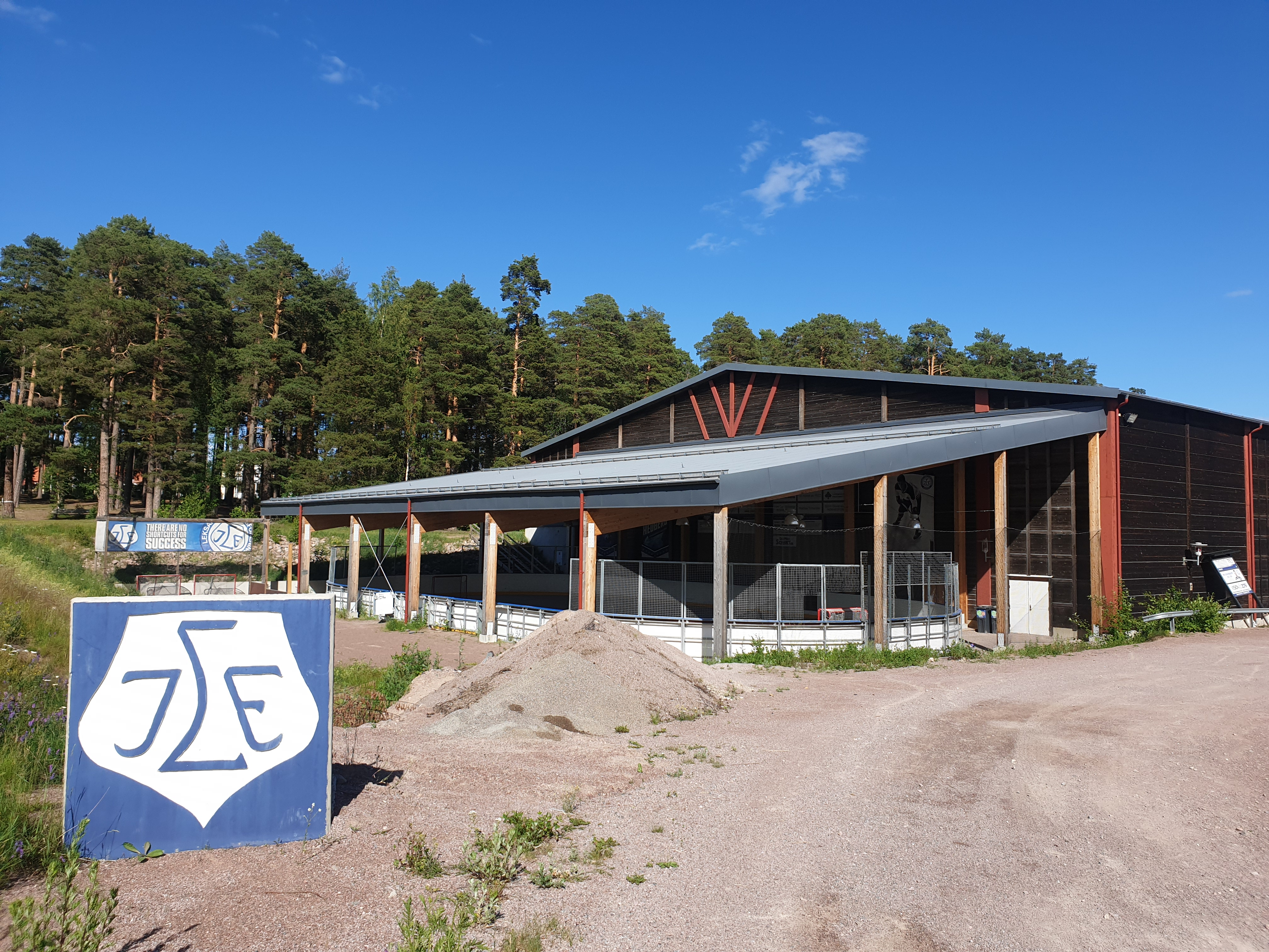 Drömmarnas arena, vid Tegera arena och Veda skog arena i Leksand, är en öppen rink som kan användas för träning och spel året om.